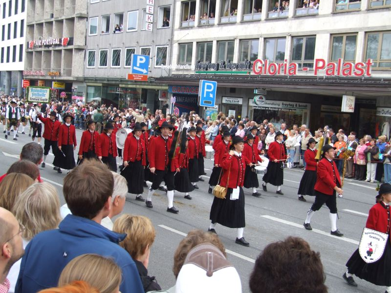 Trachtenzug Oktoberfest